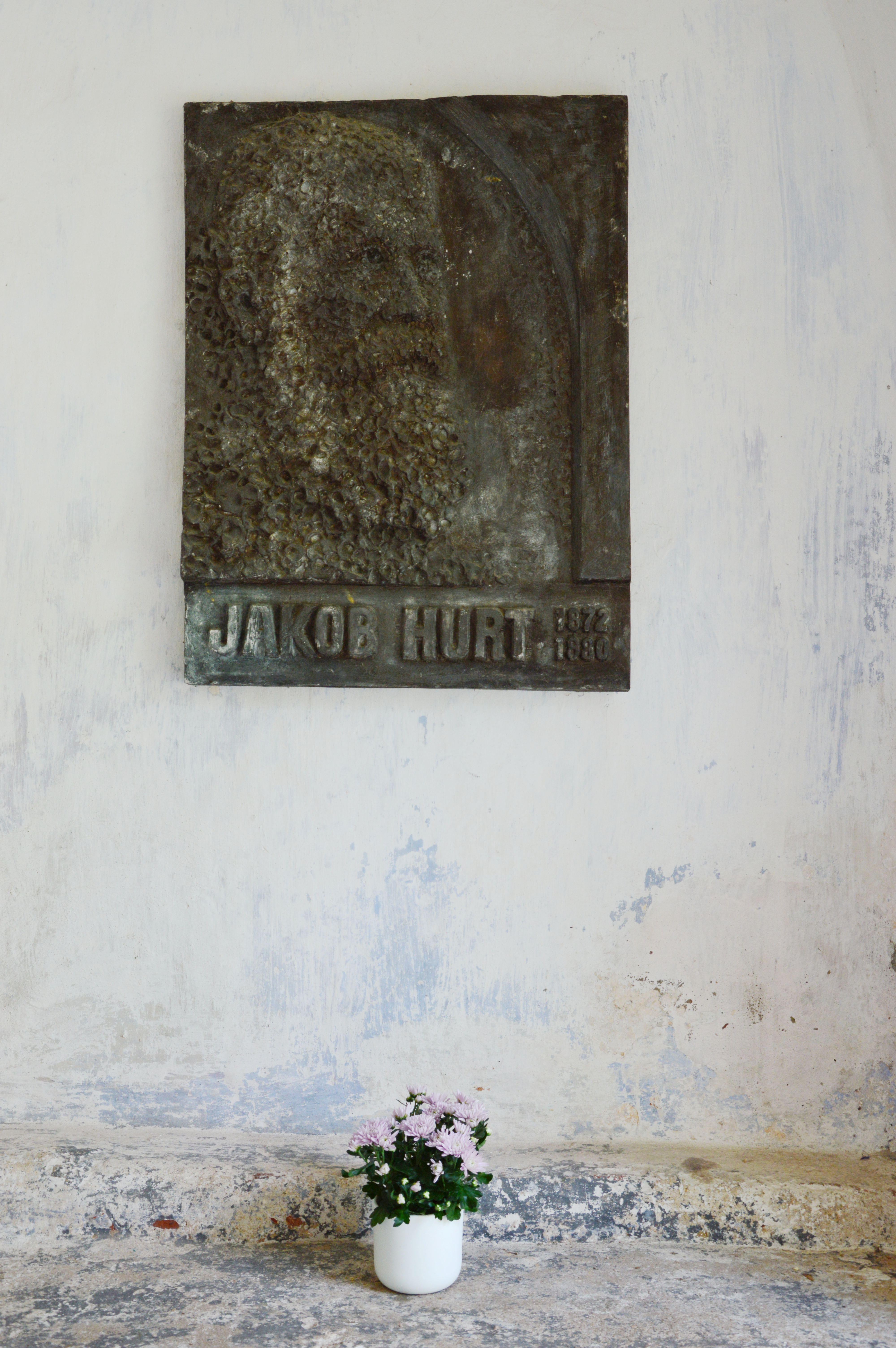 Jakob Hurda bareljeef Otepää kirikus